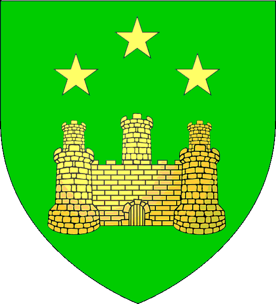 Blasón de la Casa Polizzi